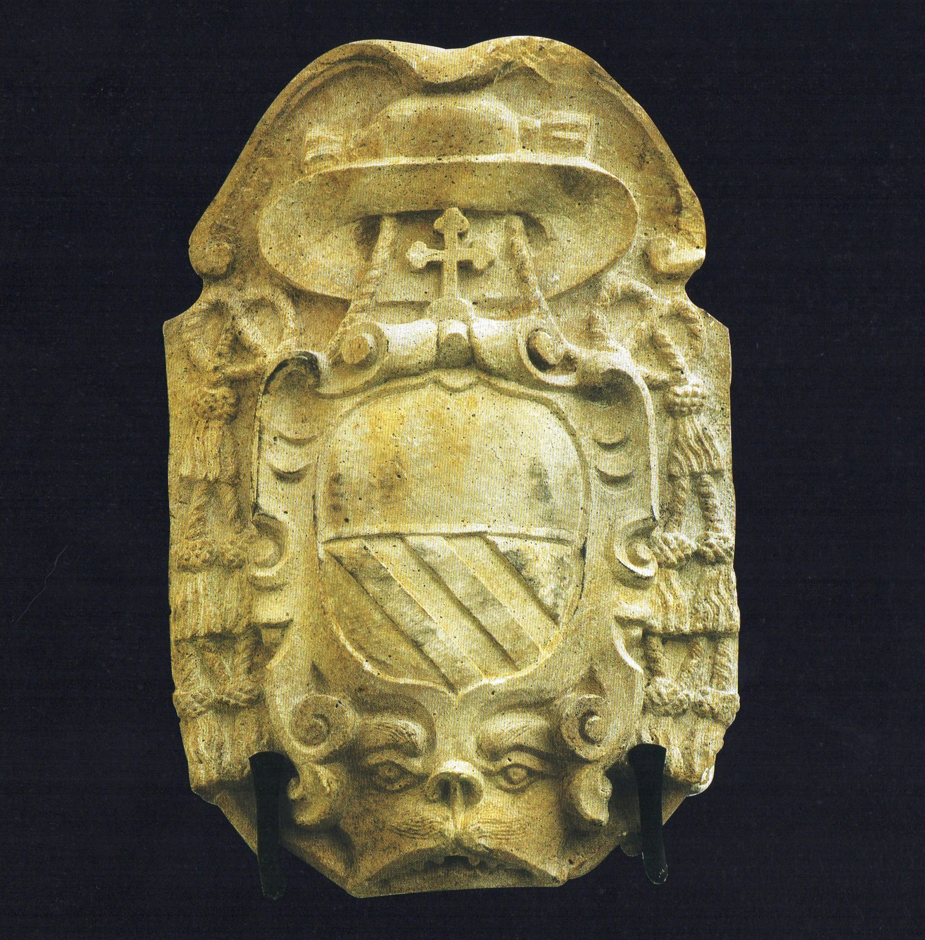 Apparteneva ai duchi di Belcastro, nacque nel 1656 a Napoli da Tommaso e da Vittoria Sersale. Fu il cardinale Innico Caracciolo, arcivescovo di Napoli, a proporlo alla guida della cattedra conzana e a consacrarlo arcivescovo di Conza nel 1682 nella cattedrale di Napoli.